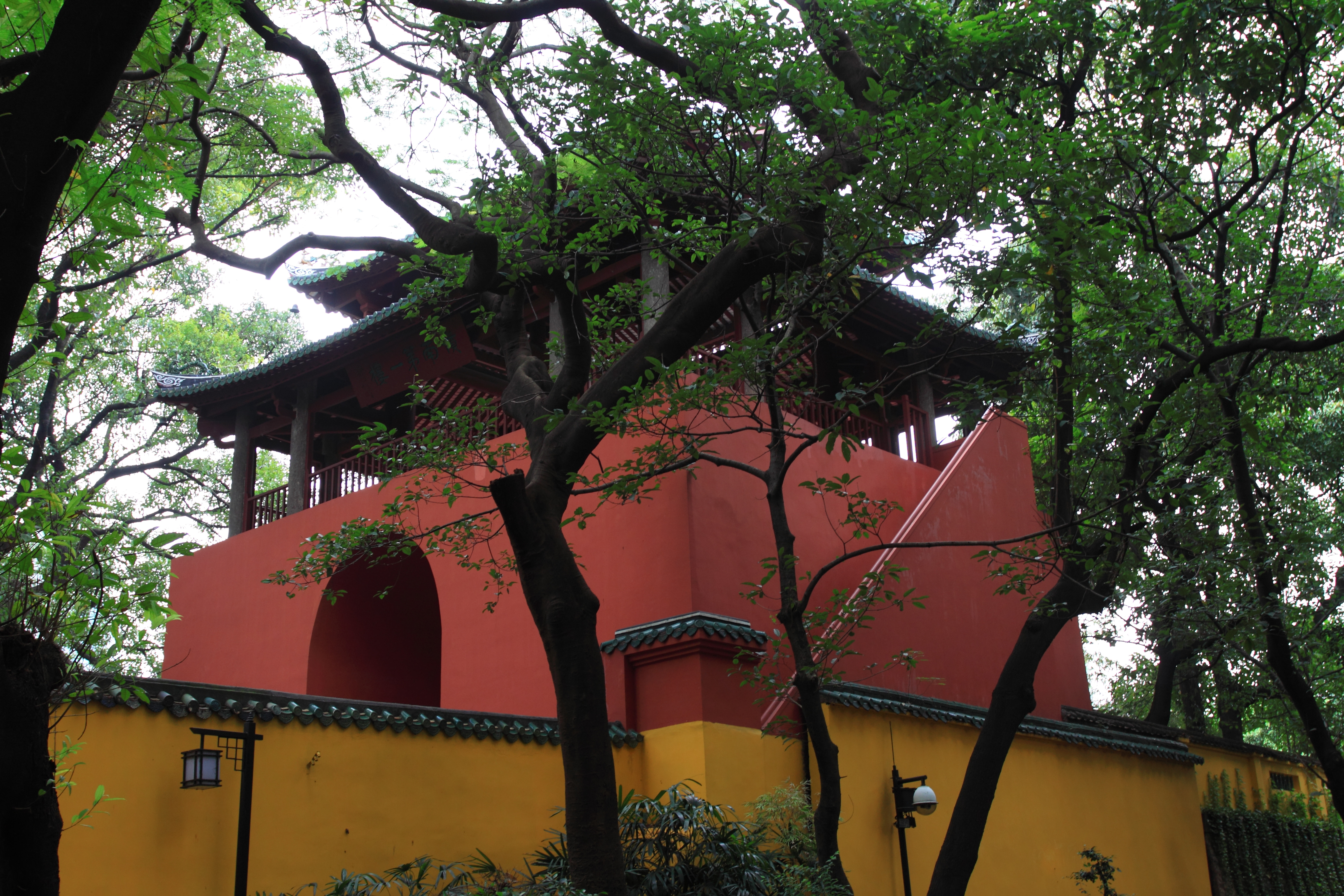 五仙观岭南第一楼东南角，位于中国广东省广州市。